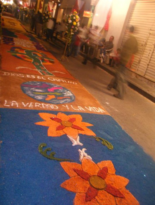 Muestras artísticas de los tapetes realizados en Uriangato, Gto.